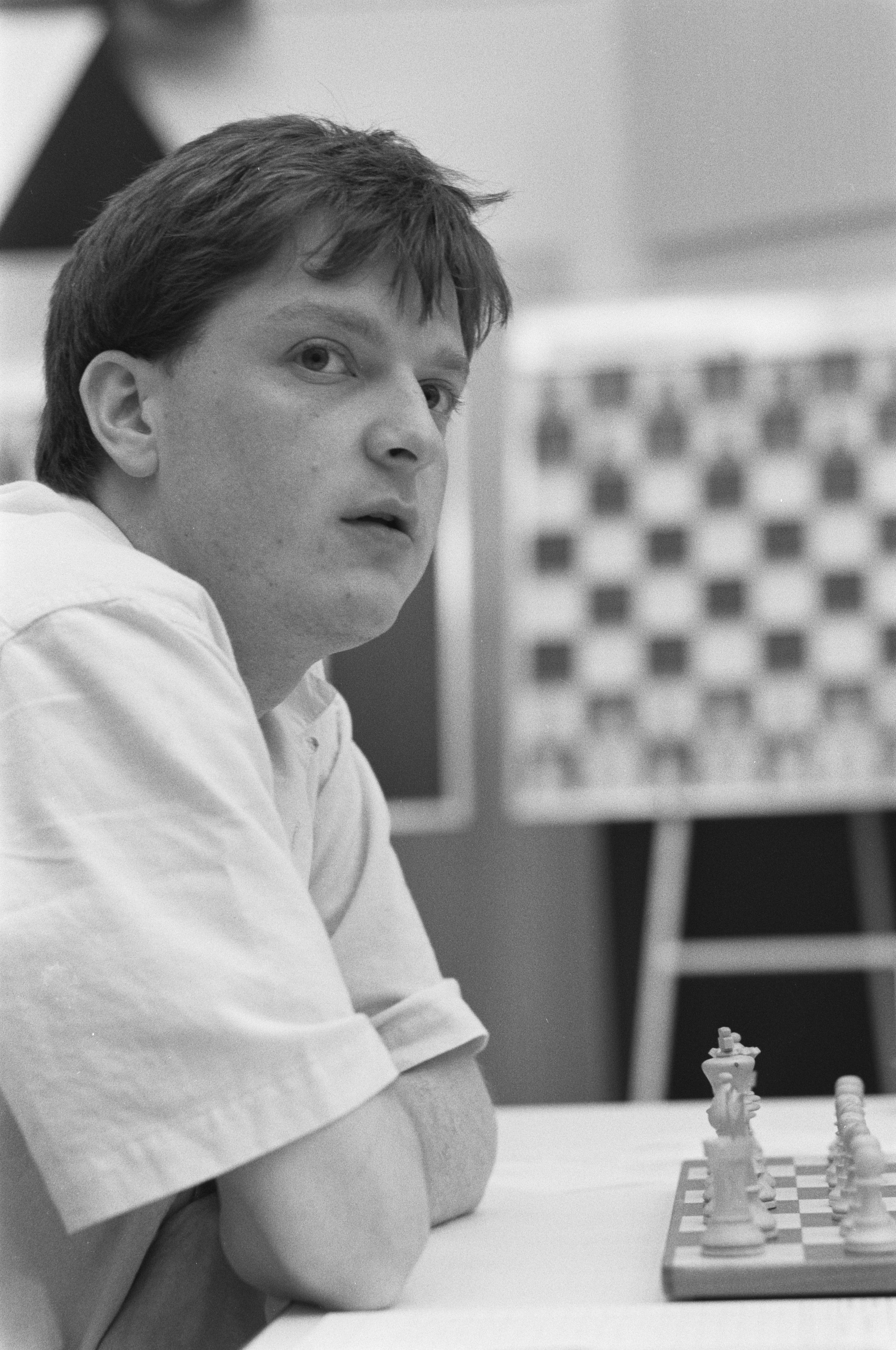 Collectie / Archief : Fotocollectie Anefo Reportage / Serie : [ onbekend ] Beschrijving : NK schaken; Rudy Douven , close Datum : 20 juni 1988 Locatie : Hilversum Trefwoorden : schaken Fotograaf : Croes, Rob C. / Anefo Auteursrechthebbende : Nationaal Archief Materiaalsoort : Negatief (zwart/wit) Nummer archiefinventaris : bekijk toegang 2.24.01.05 Bestanddeelnummer : 934-2710